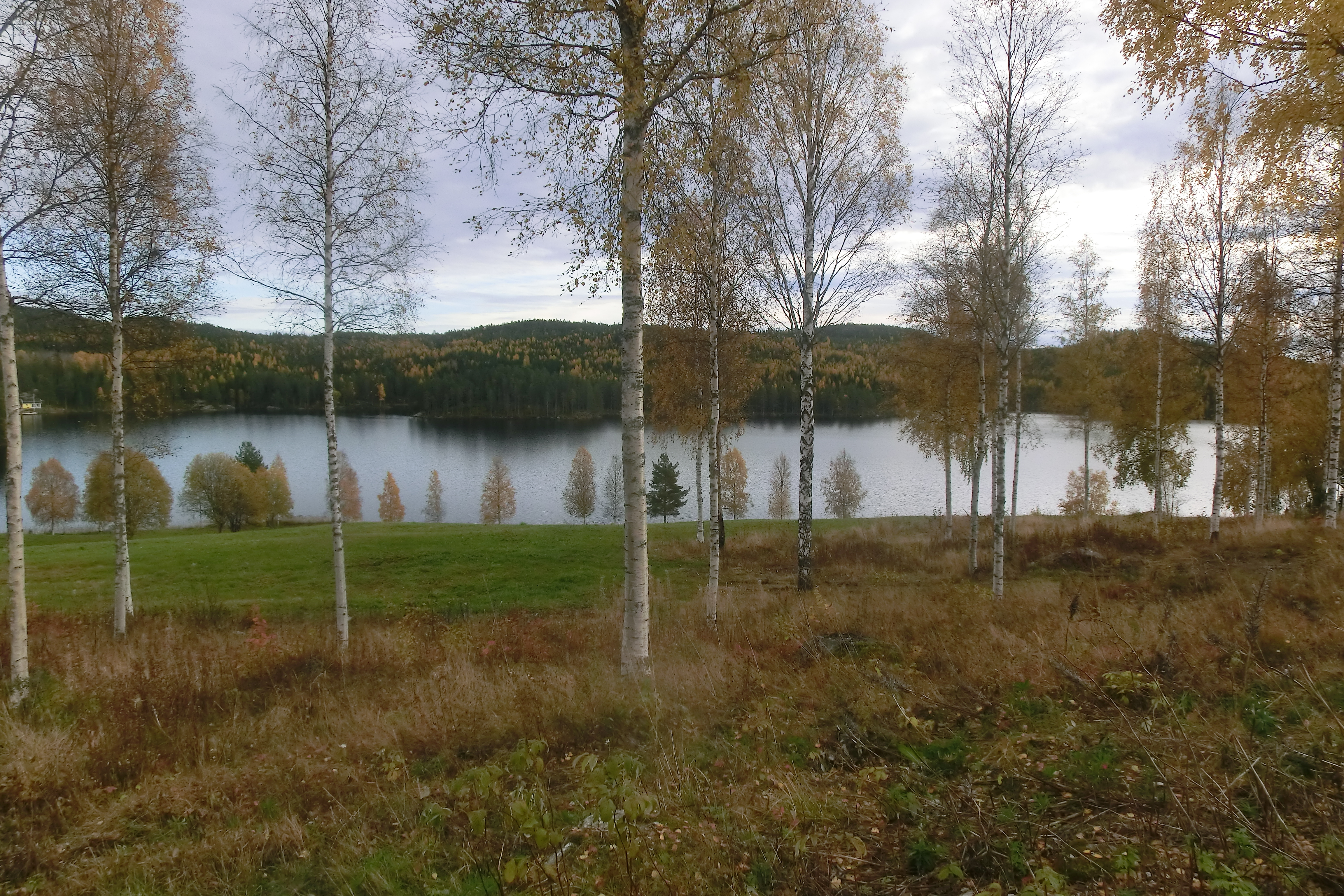 Stor-Åkersjön